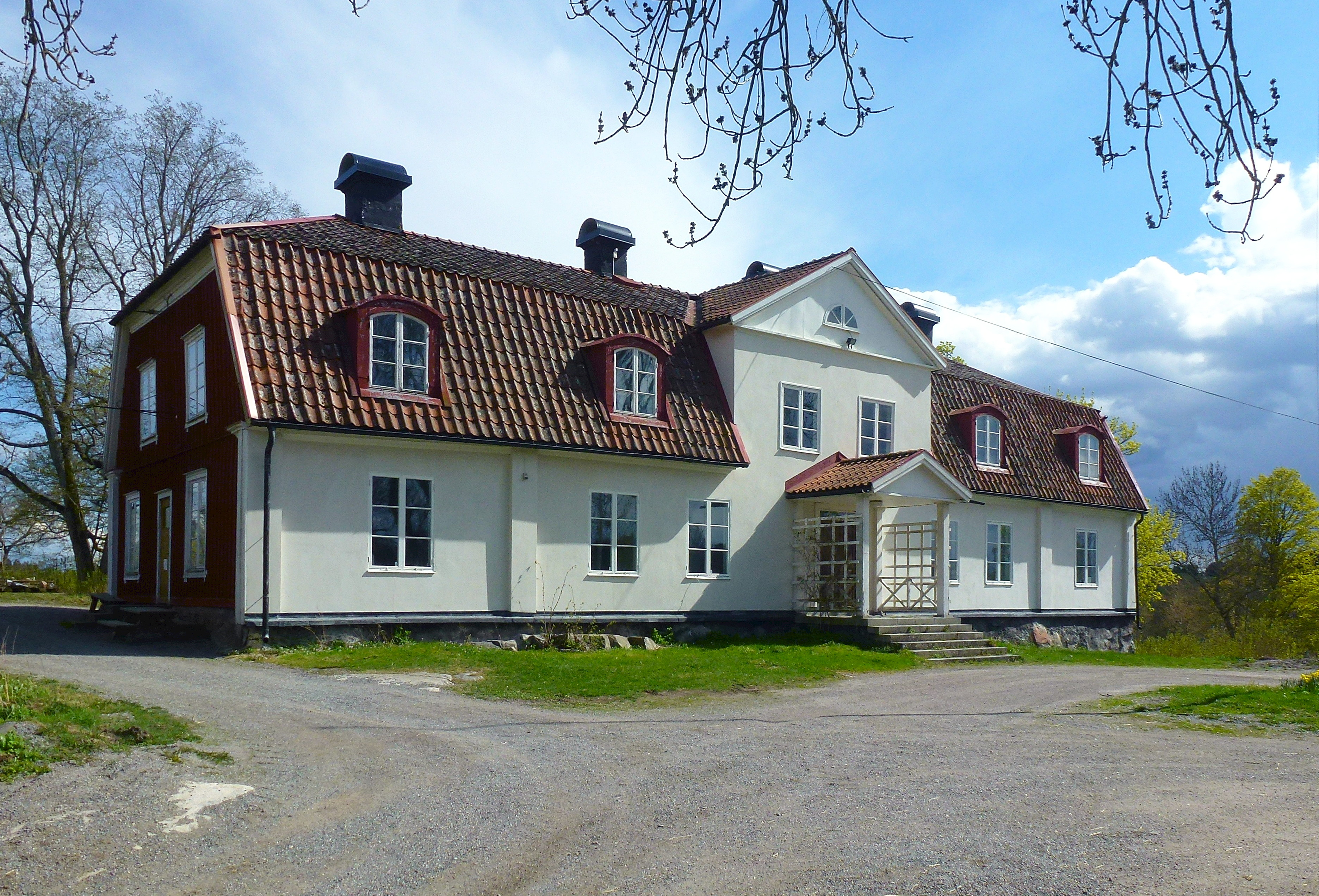 Hästa gård huvudbyggnad, entréfasad